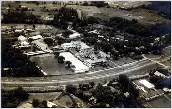 ภาพโรงเรียนสารสิทธิ์พิทยาลัยสมัยก่อน